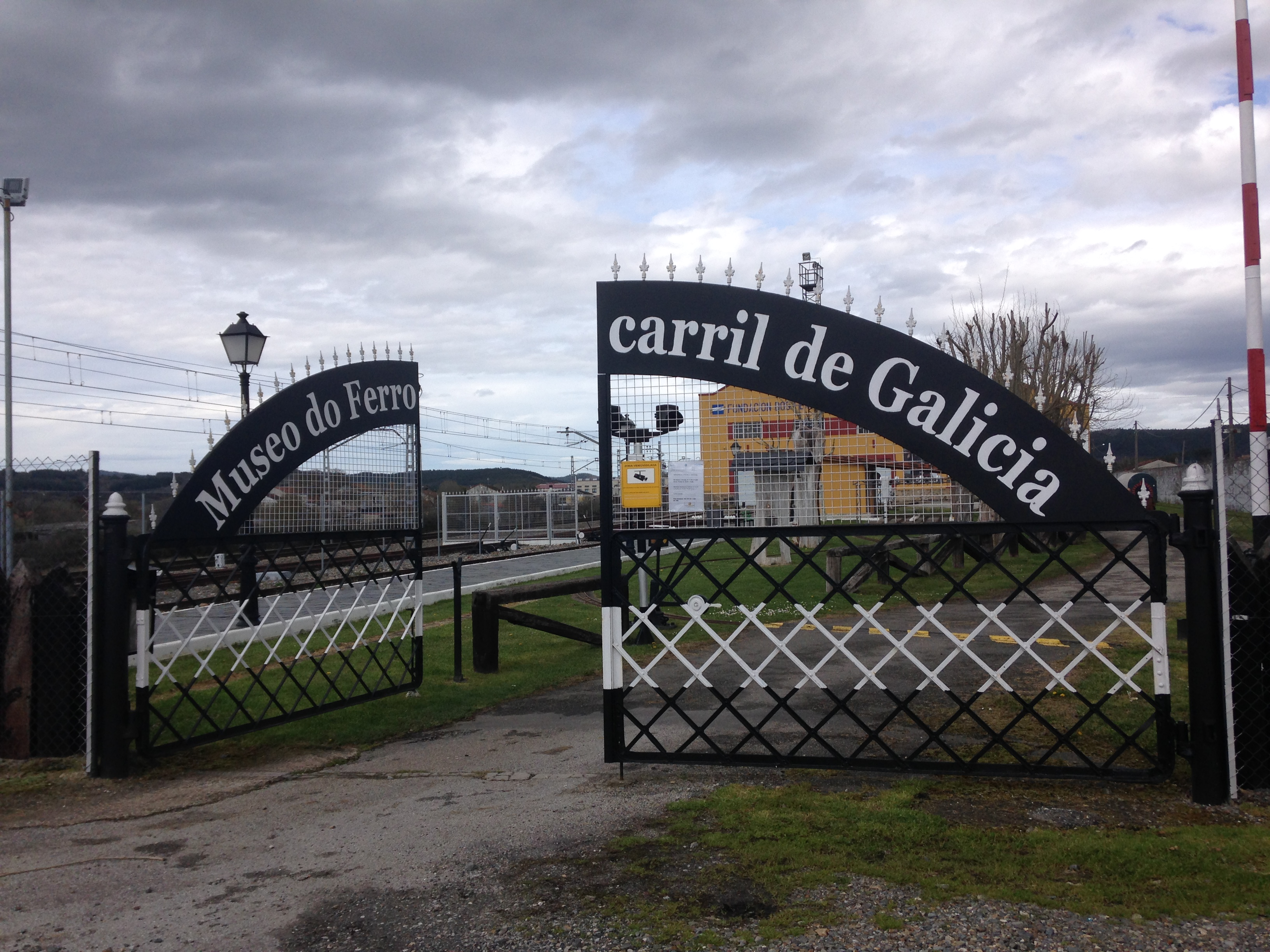 Entrada ao Museo do ferrocarril de Monforte de Lemos.